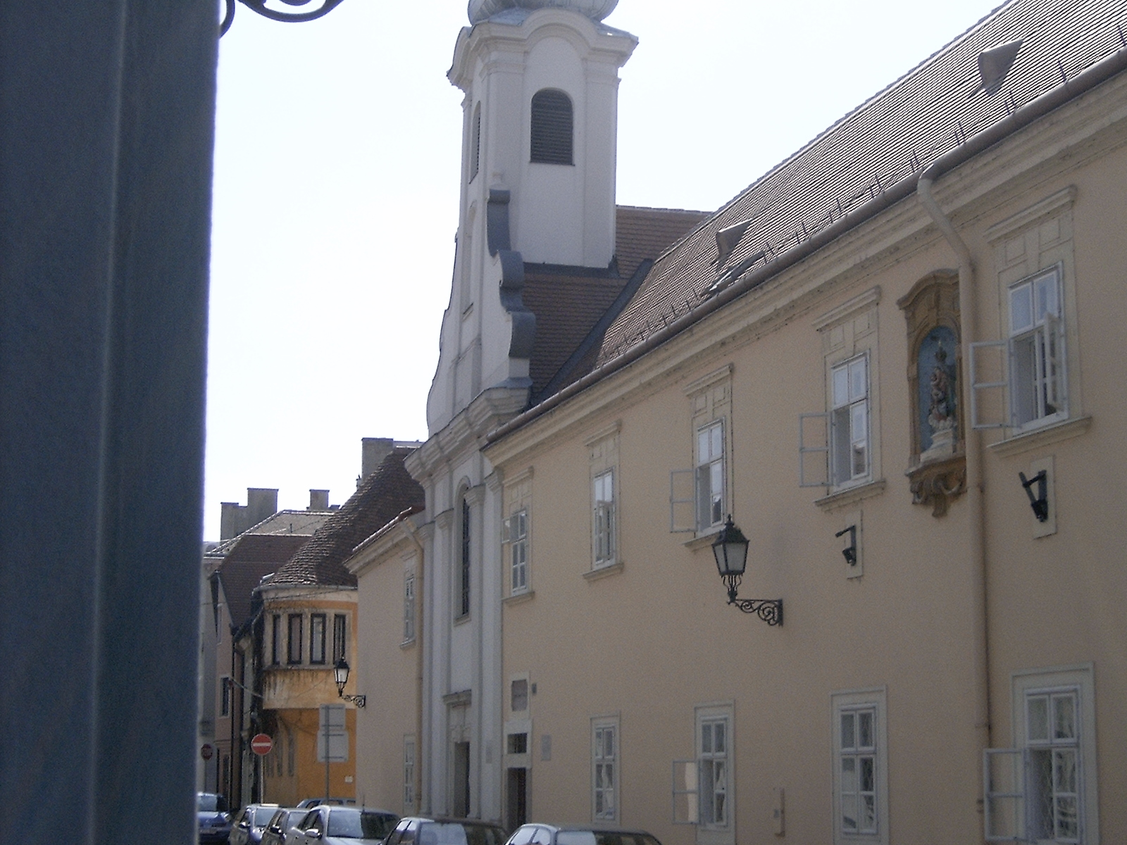 Vörösmarty_u._a_Német_ispitával Győrben